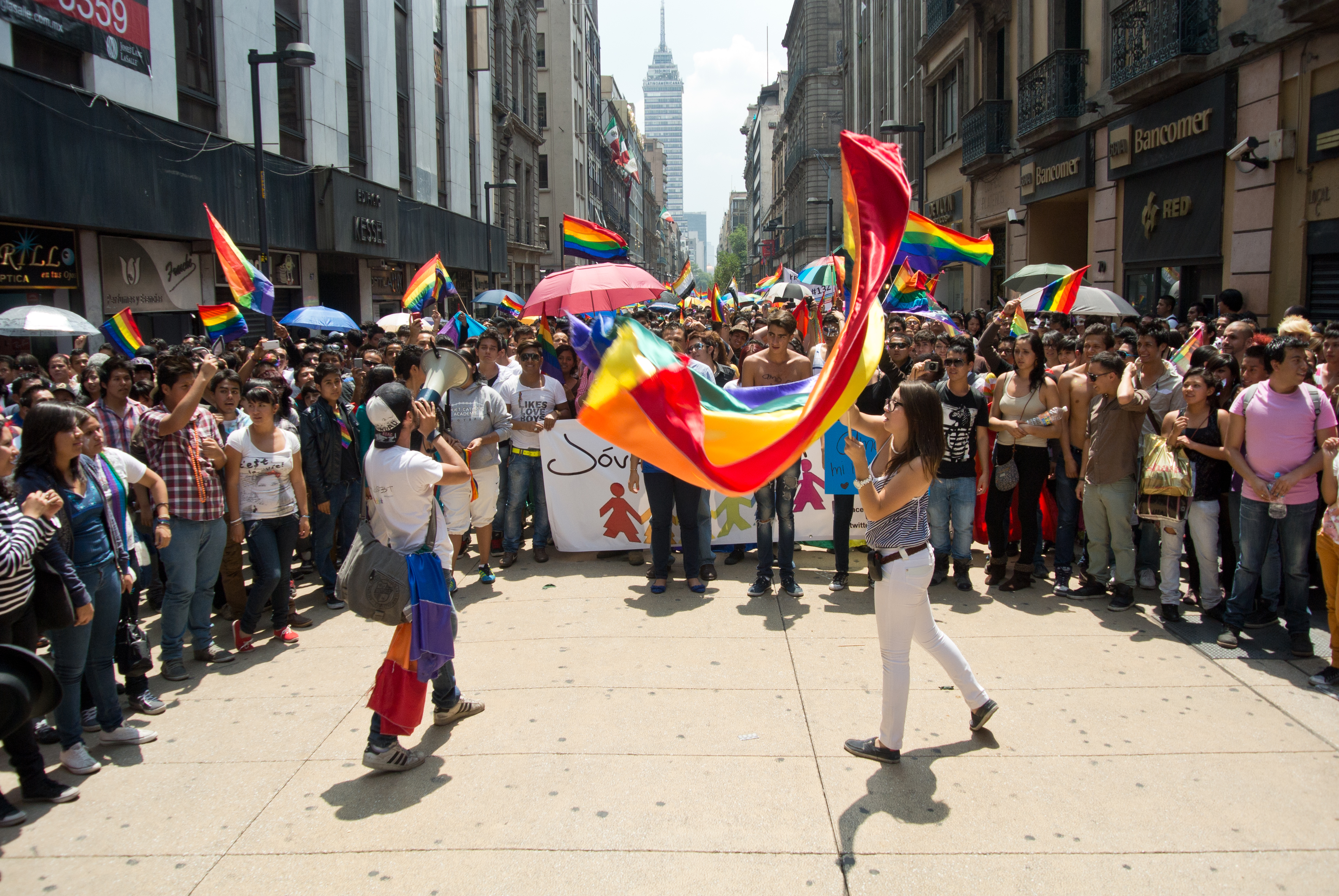 Día Internacional del Orgullo LGTB. Centro Histórico, Ciudad de México